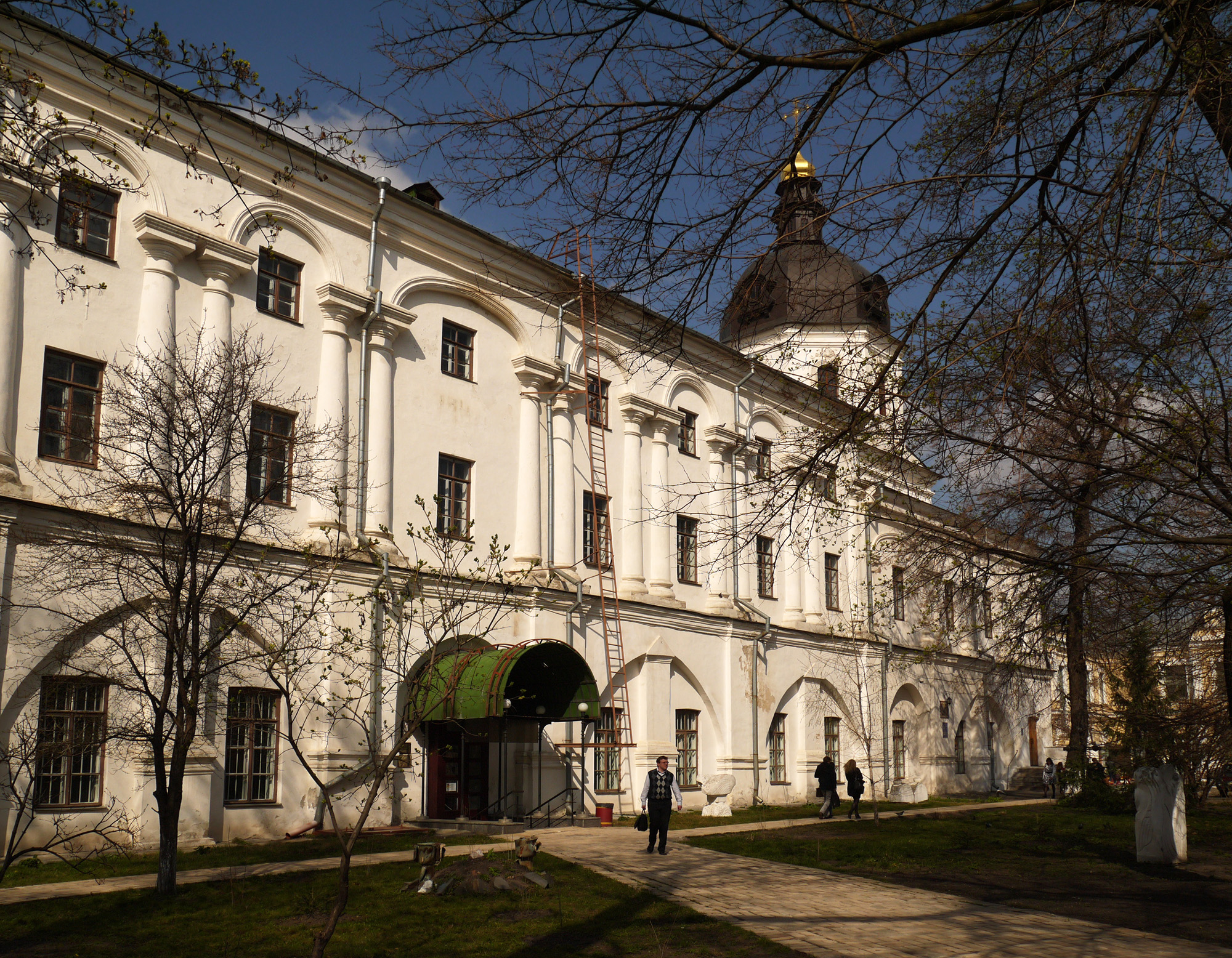 Корпус академічний старий, в якому навчалися: Г. Сковорода, філософ, поет; М. Амбодик-Максимович, вчений-енциклопедист; М. Березовський, композитор та інші, Київ, Сковороди Григорія вул., 2-а